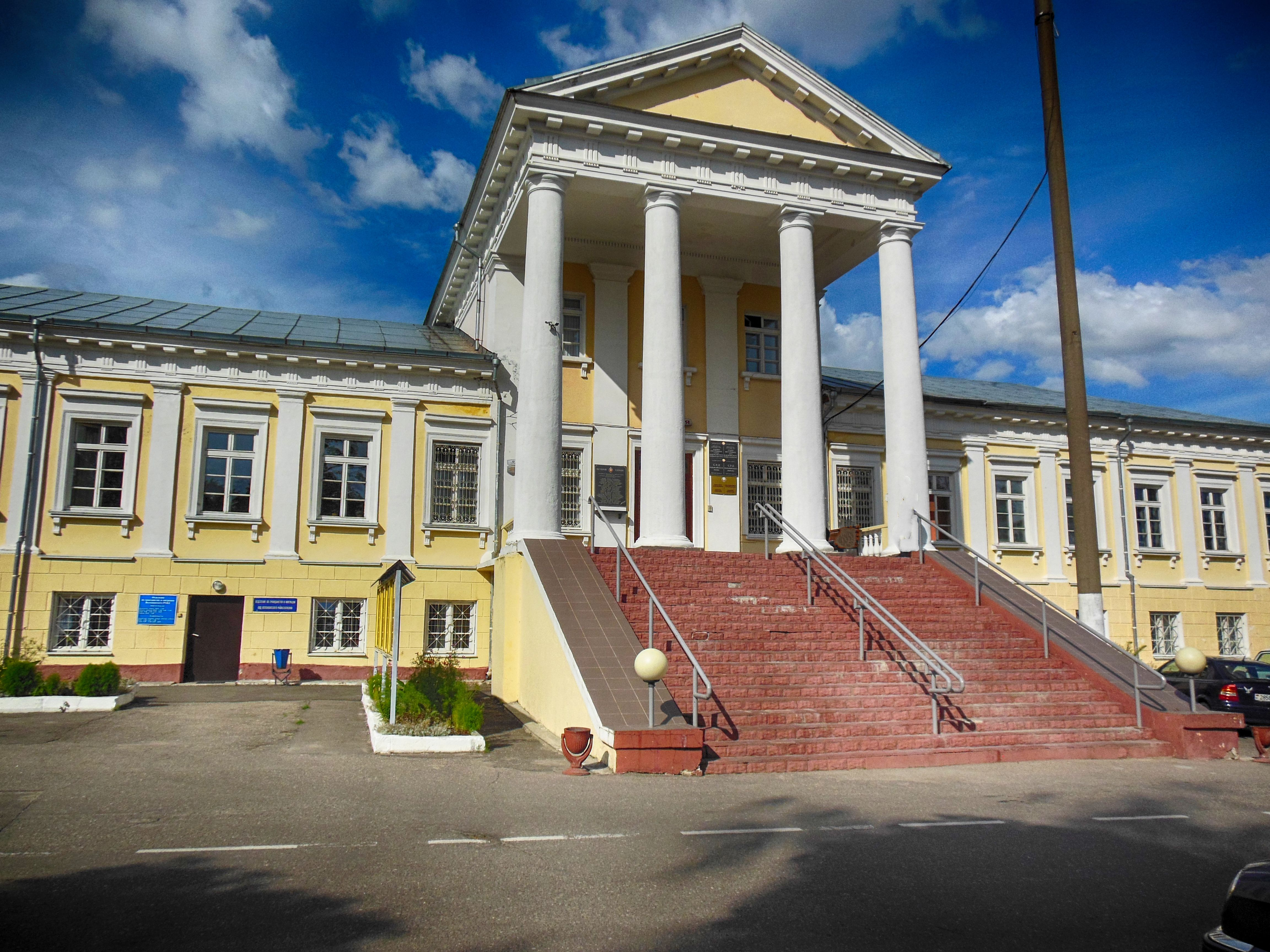 Беларуская (тарашкевіца): Ансамбль былой рэзыдэнцыі графаў Тышкевічаў: галоўны корпус два флігелі фрагмэнты парку. г. Валожын This is a photo of Belarusian heritage monument. Reference number: 612Г000075 ( WLM)